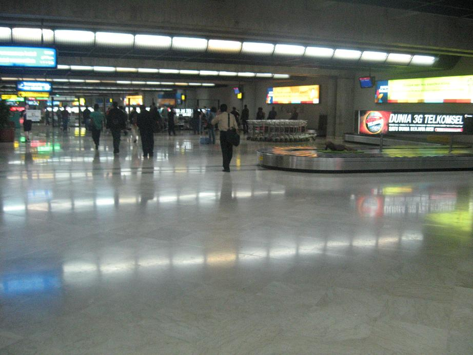 Baggage claim at terminal 2 F Soekarno Hatta International Airport